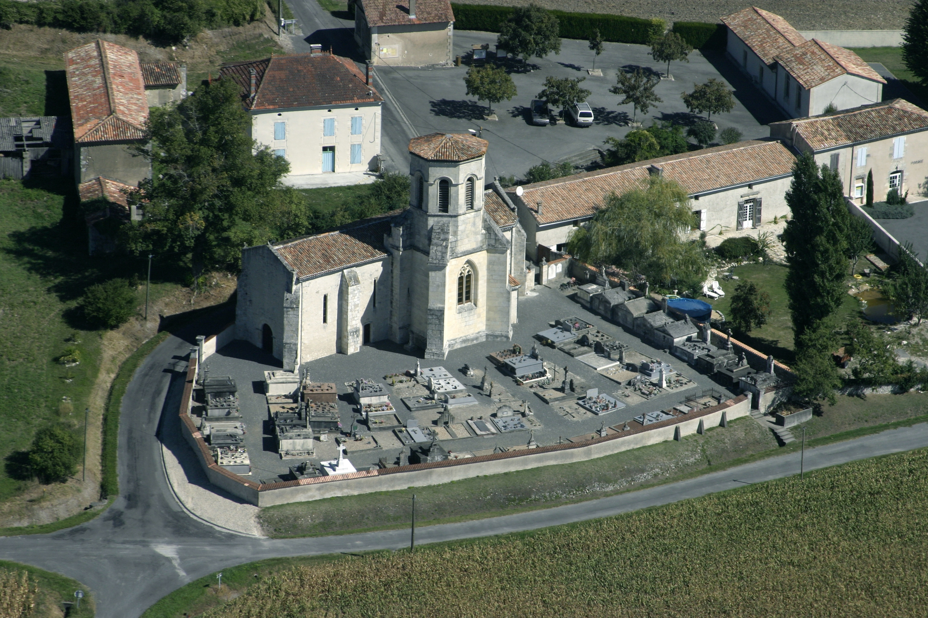 Reconstruite aux 12ème et 13ème siècles, puis restaurée au 18ème siècle, l'église de Sousmoulins est entourée de son cimetière.